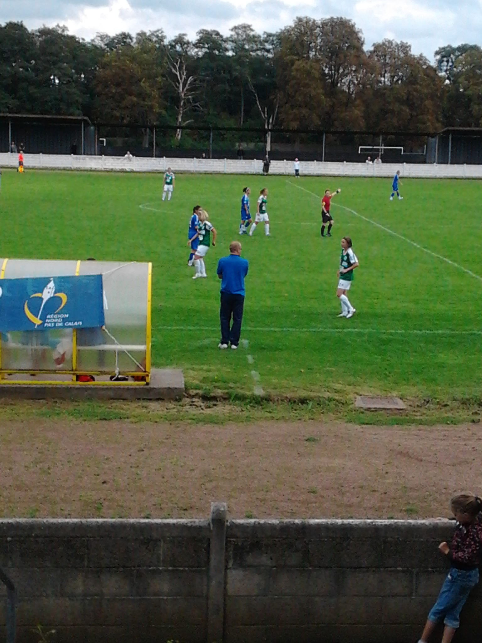 Photo de Yannick Ansart (en bleu; premier plan) lors de son premier match sur le banc du FCF Hénin-Beaumont, le 4 septembre 2011